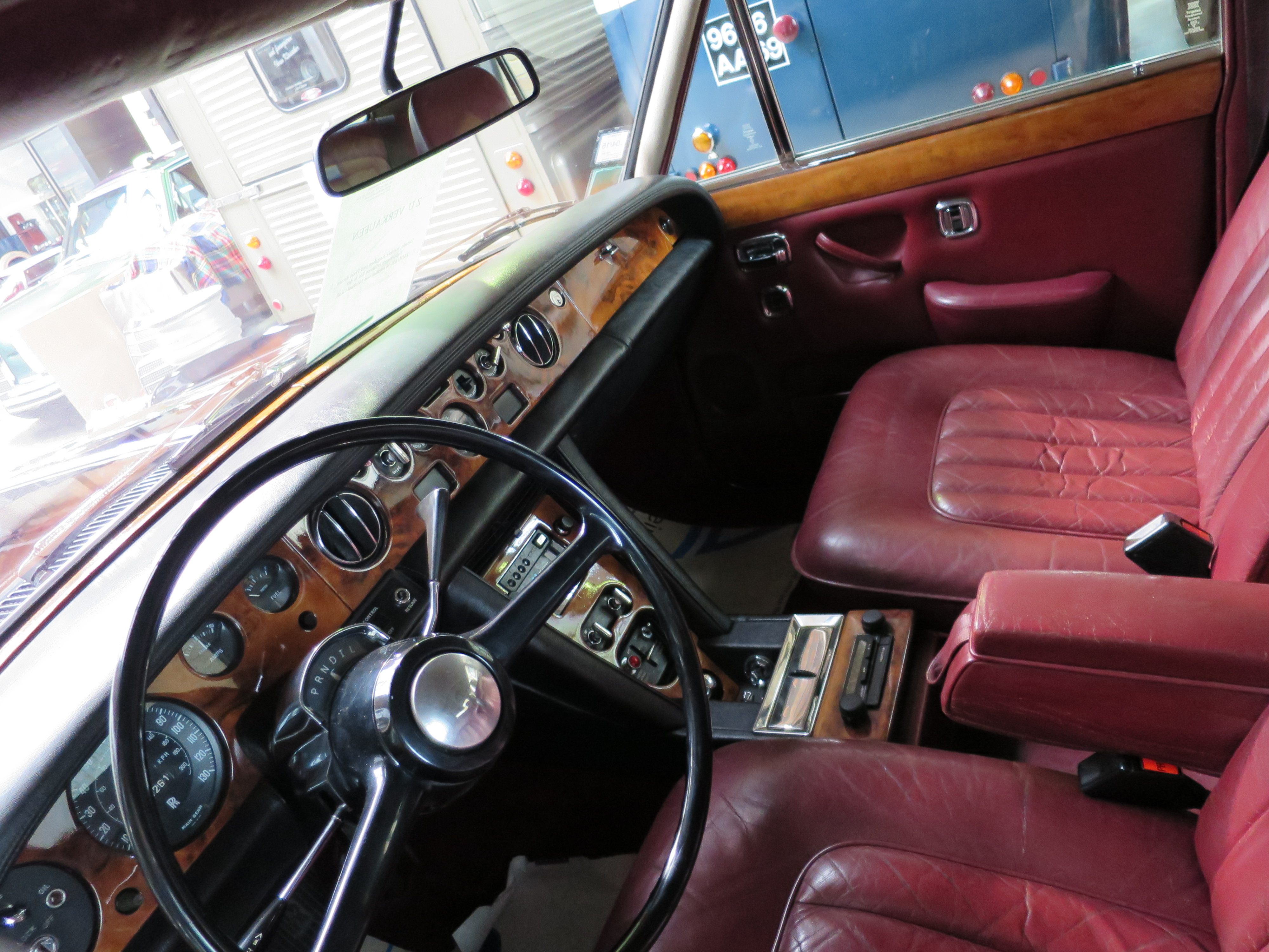 Rolls-Royce Phantom VI